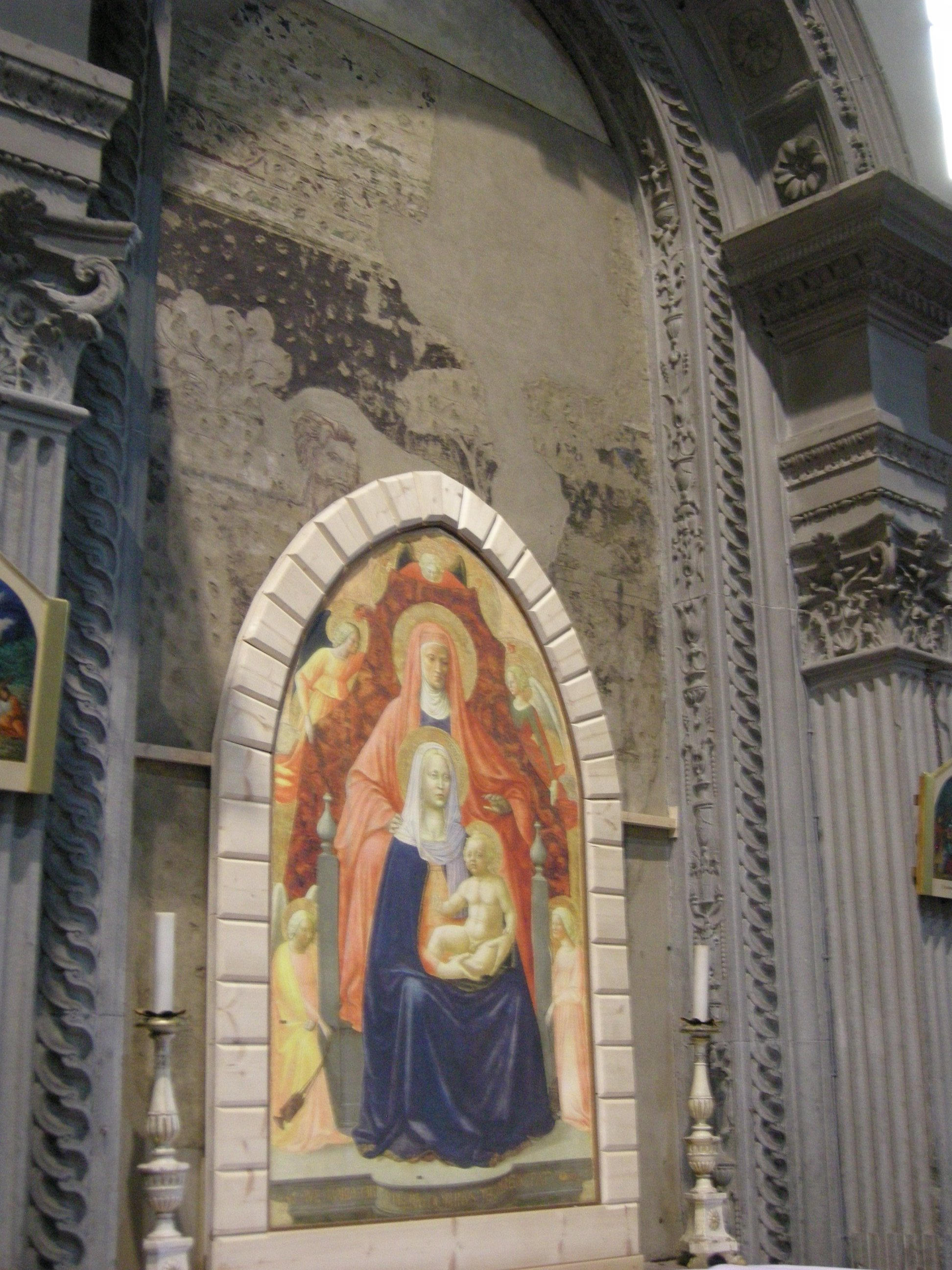 Sant'ambrogio, firenze, altare della metterza, con sant'onofrio del amestro di Figline